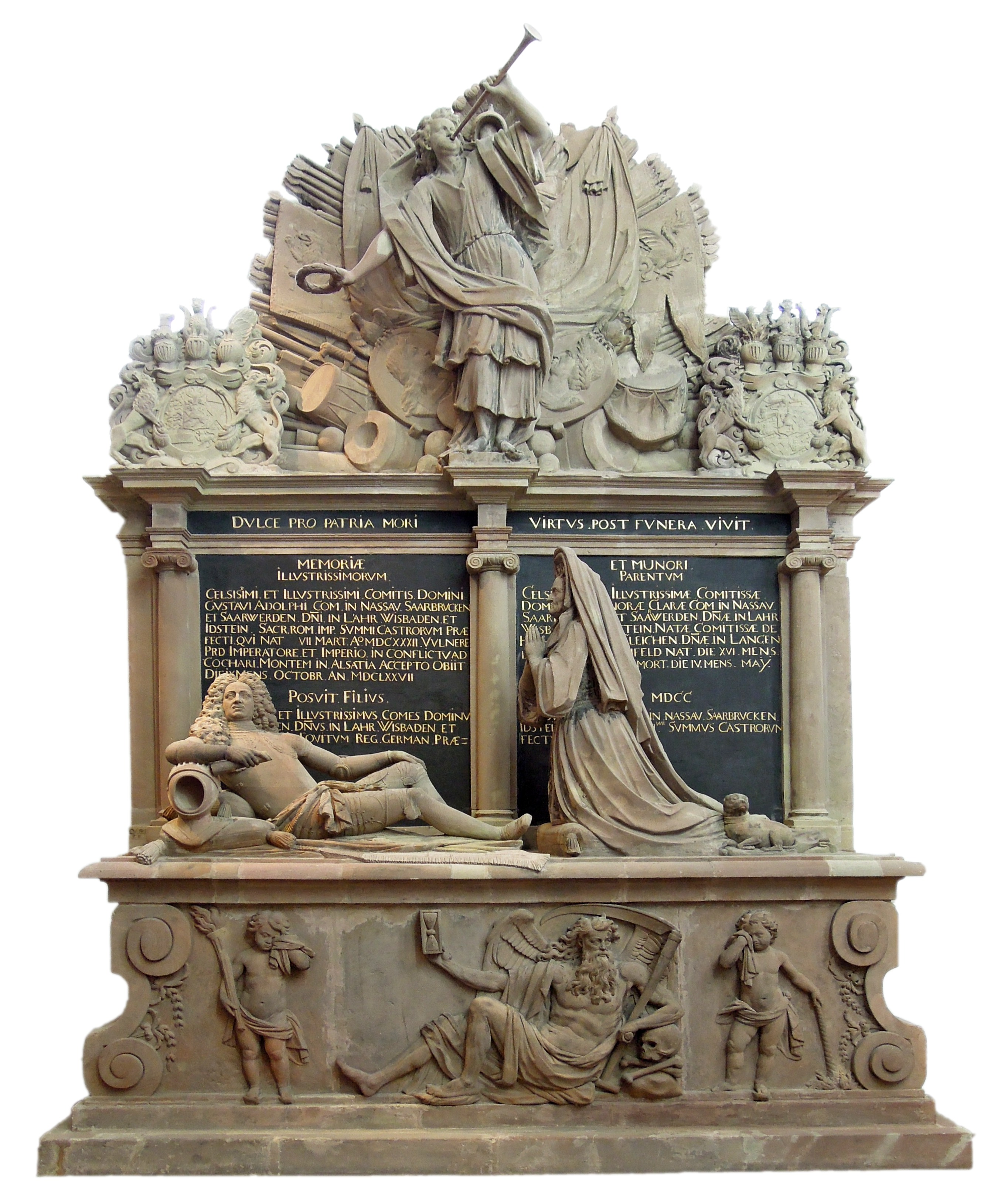 Schlosskirche in Saarbrücken: Memorial Gustav Adolf (1632–1677), Count of Nassau-Saarbrücken and Eleonore Klara of Hohenlohe-Neuenstein (1632–1709)